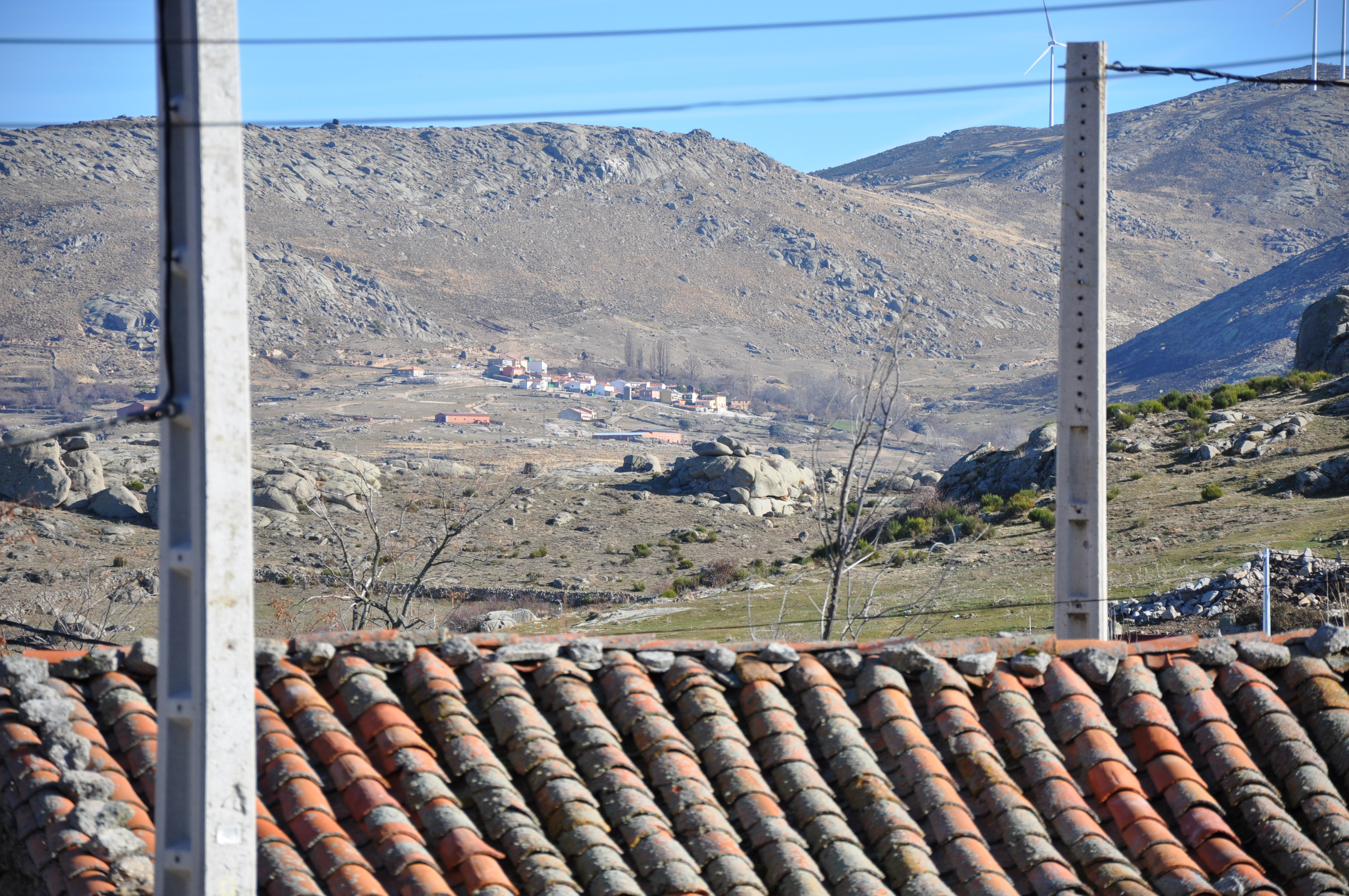 Valdecasa desde San Juan del Olmo o Grajos, Ávila, España